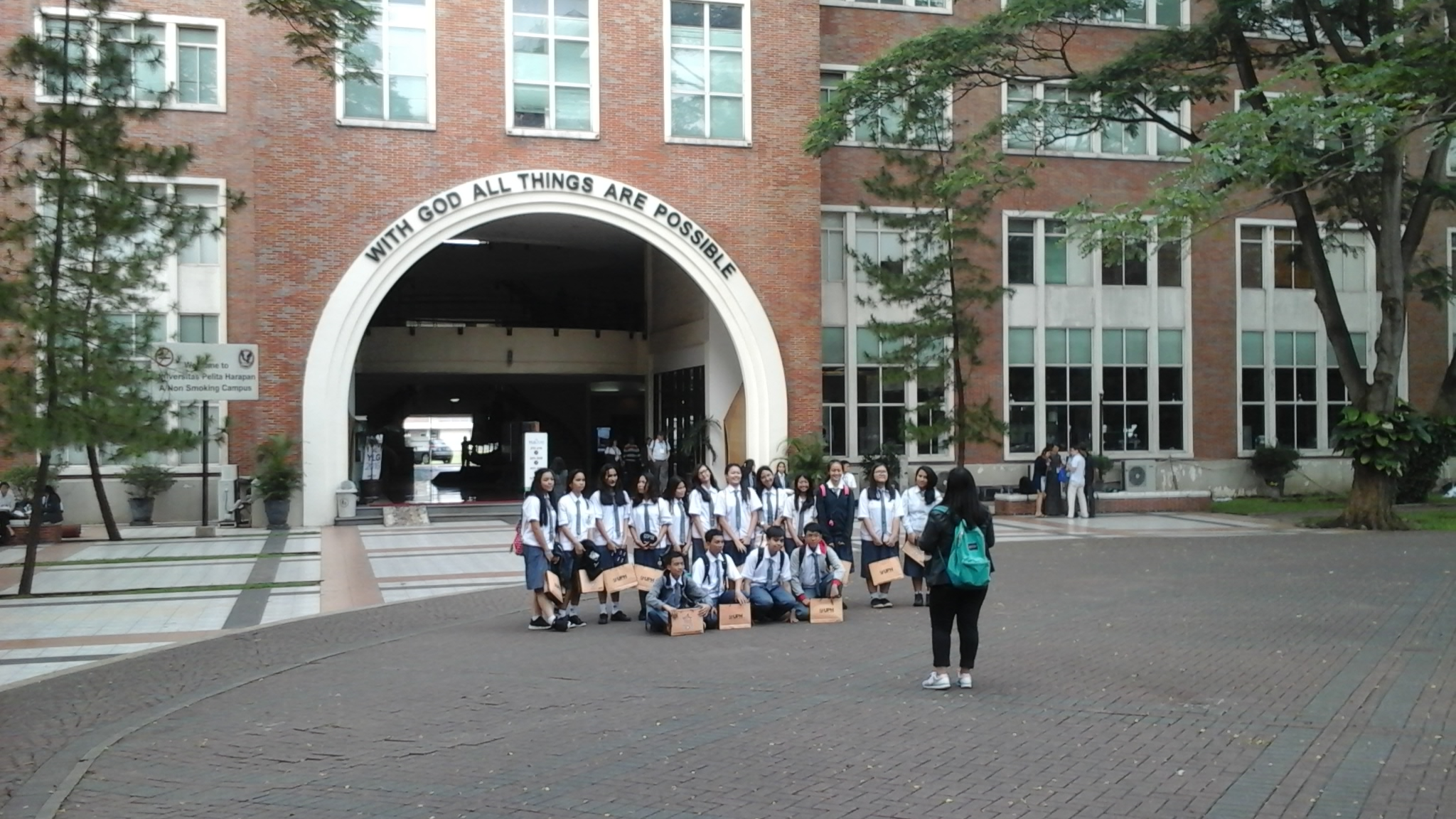 Universitas Pelita Harapan